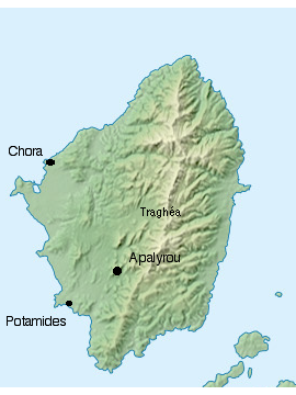 Map of Naxos for Marco Sanudo conquest/ Carte de Naxos pour la conquête par Marco Sanudo